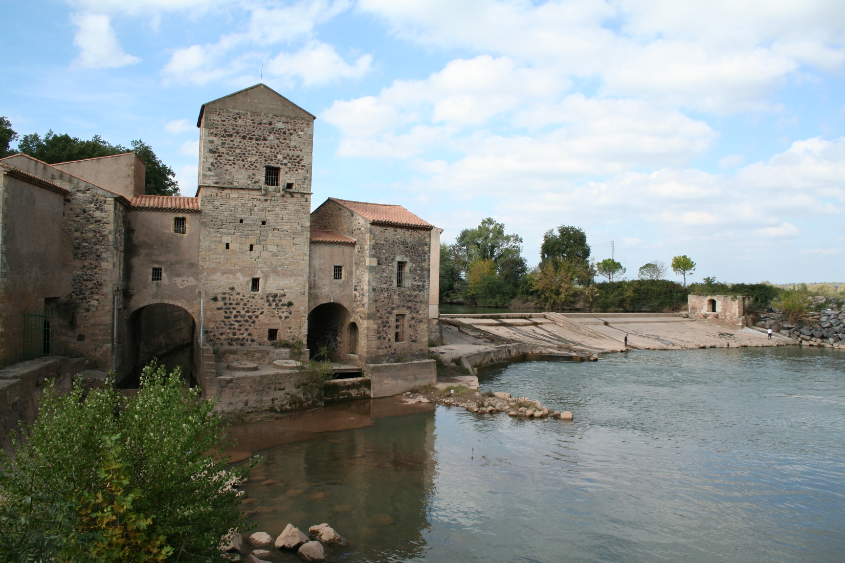 Saint-Thibéry (Hérault) - Moulin médiéval sur l'Hérault, situé près du pont romain. Auteur : Fagairolles 34